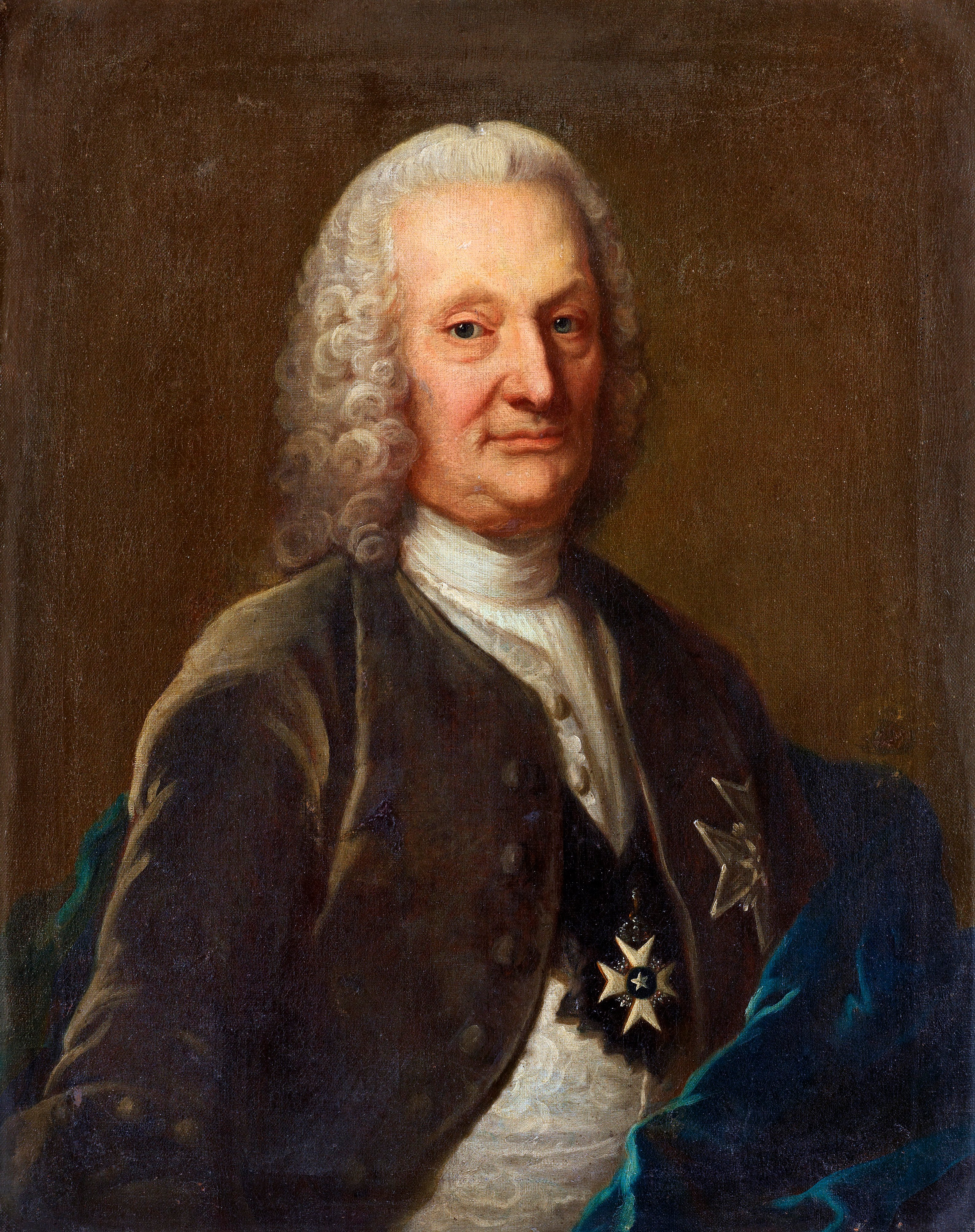 Friherren Jonas Wulfwenstierna (1681-1762)